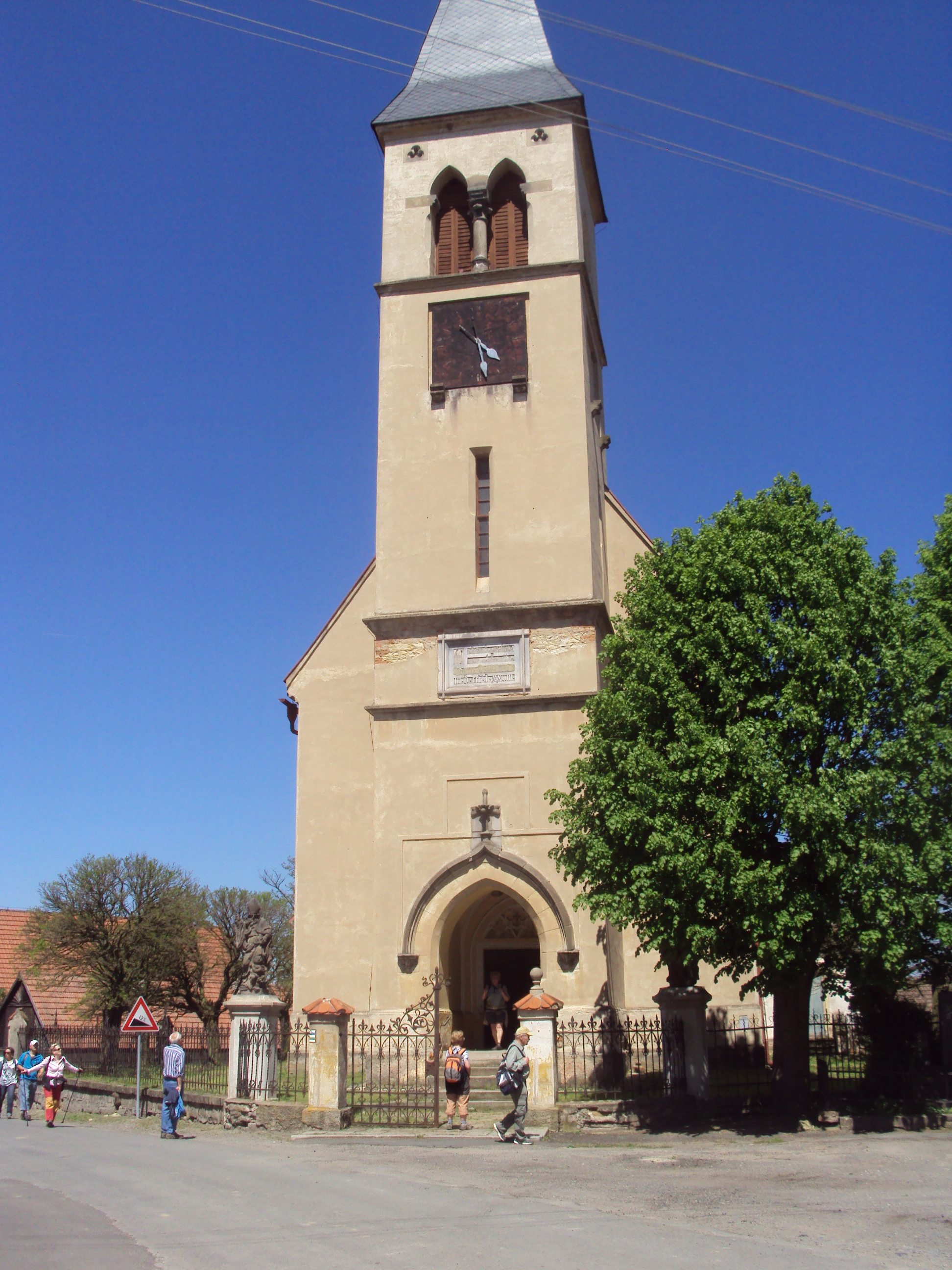 Kostel svatého Martina - Horní Vidim